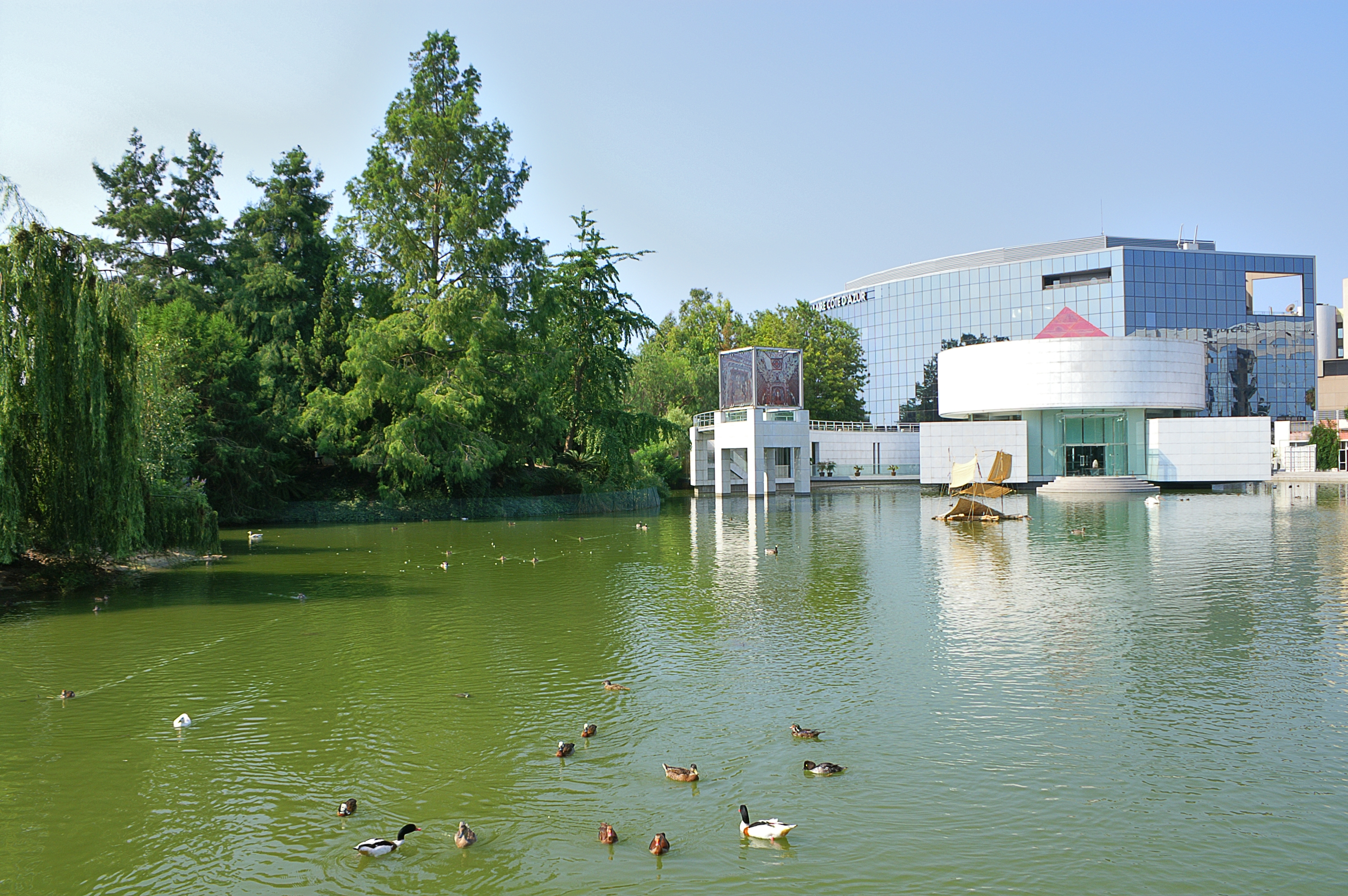 Le parc Phœnix est un parc botanique et zoologique situé à Nice, dans le département des Alpes-Maritimes, en France.